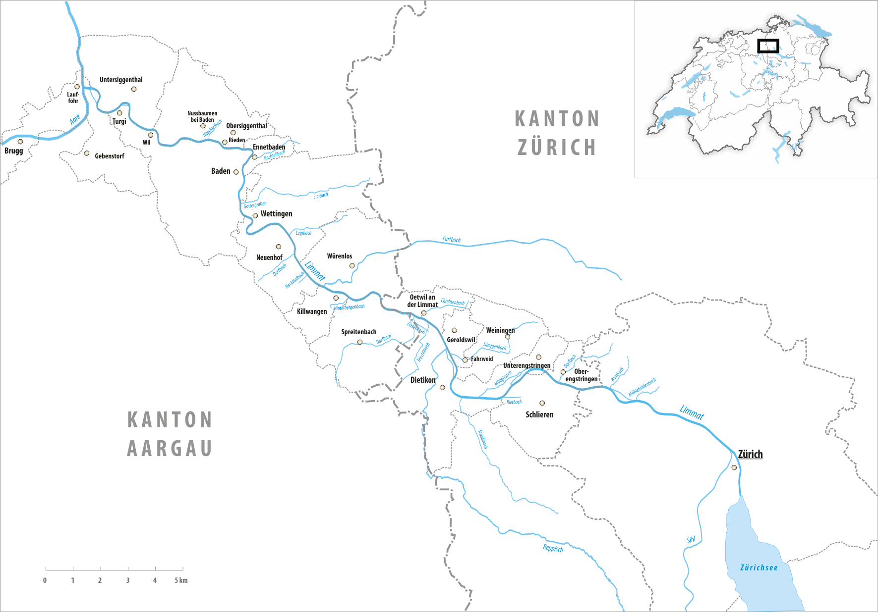 Description: Limmat Designer: Tschubby